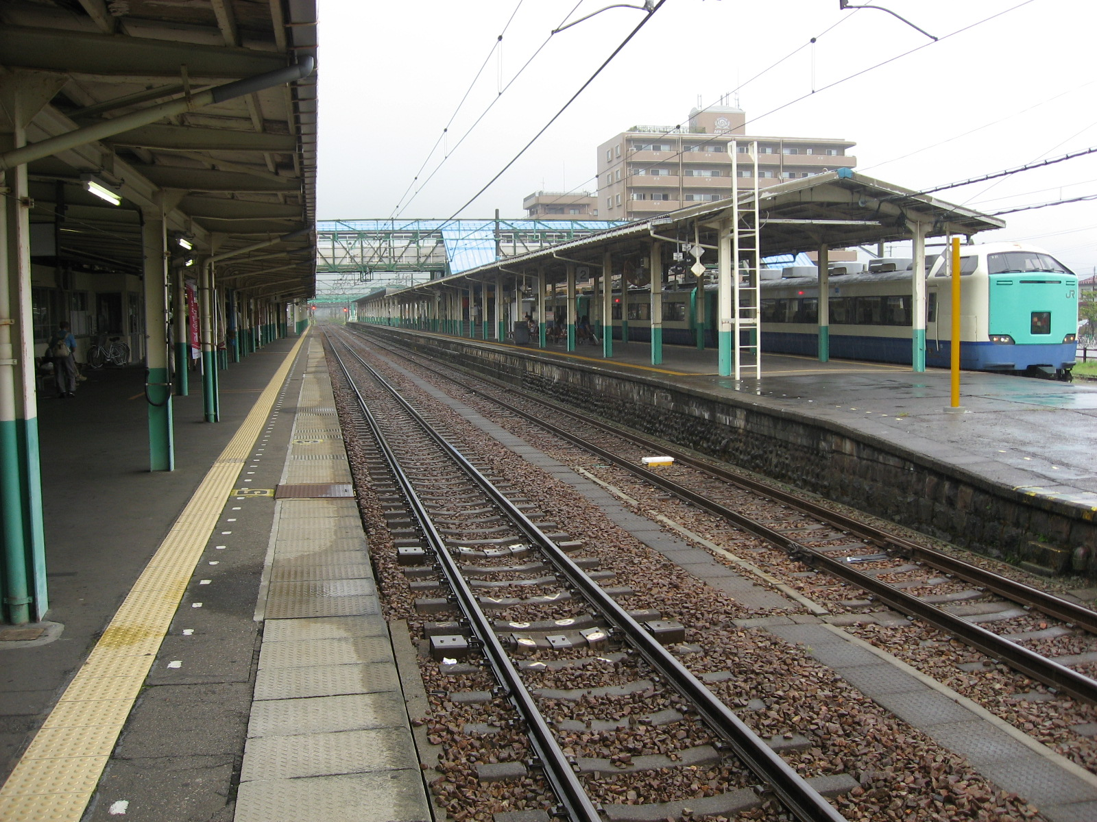 東三条駅ホーム